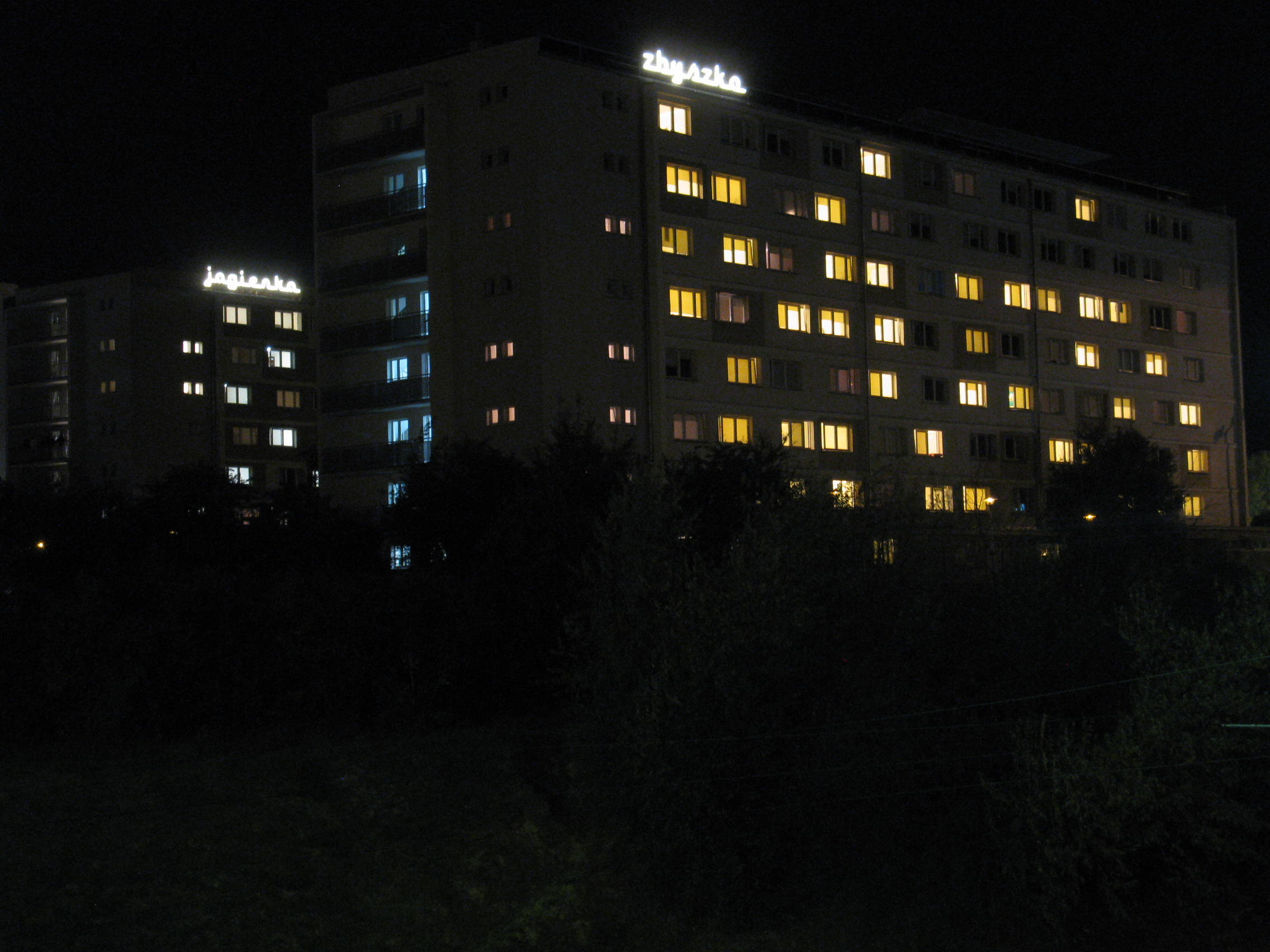 Poznań - widok na akademiki od ul. Mieszka I